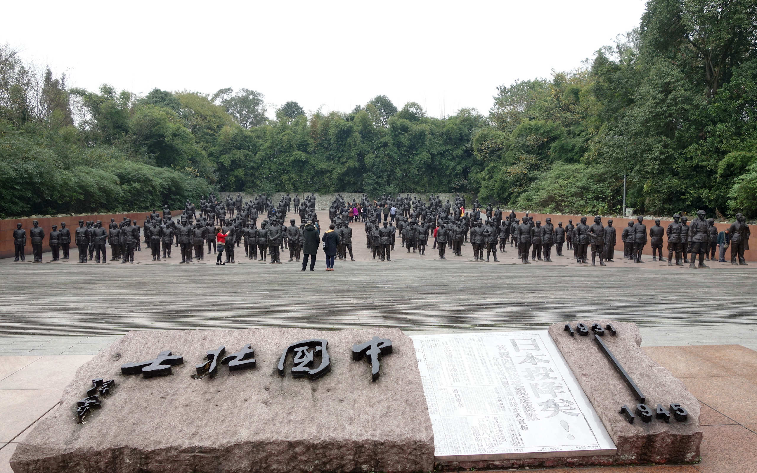 建川博物馆聚落中国壮士（1931-1945）群雕广场，以纪念中国人民抗日战争为主题，塑造1931年至1945年中国抗日战争期间的200多名民族抗日将士英雄群体形象。